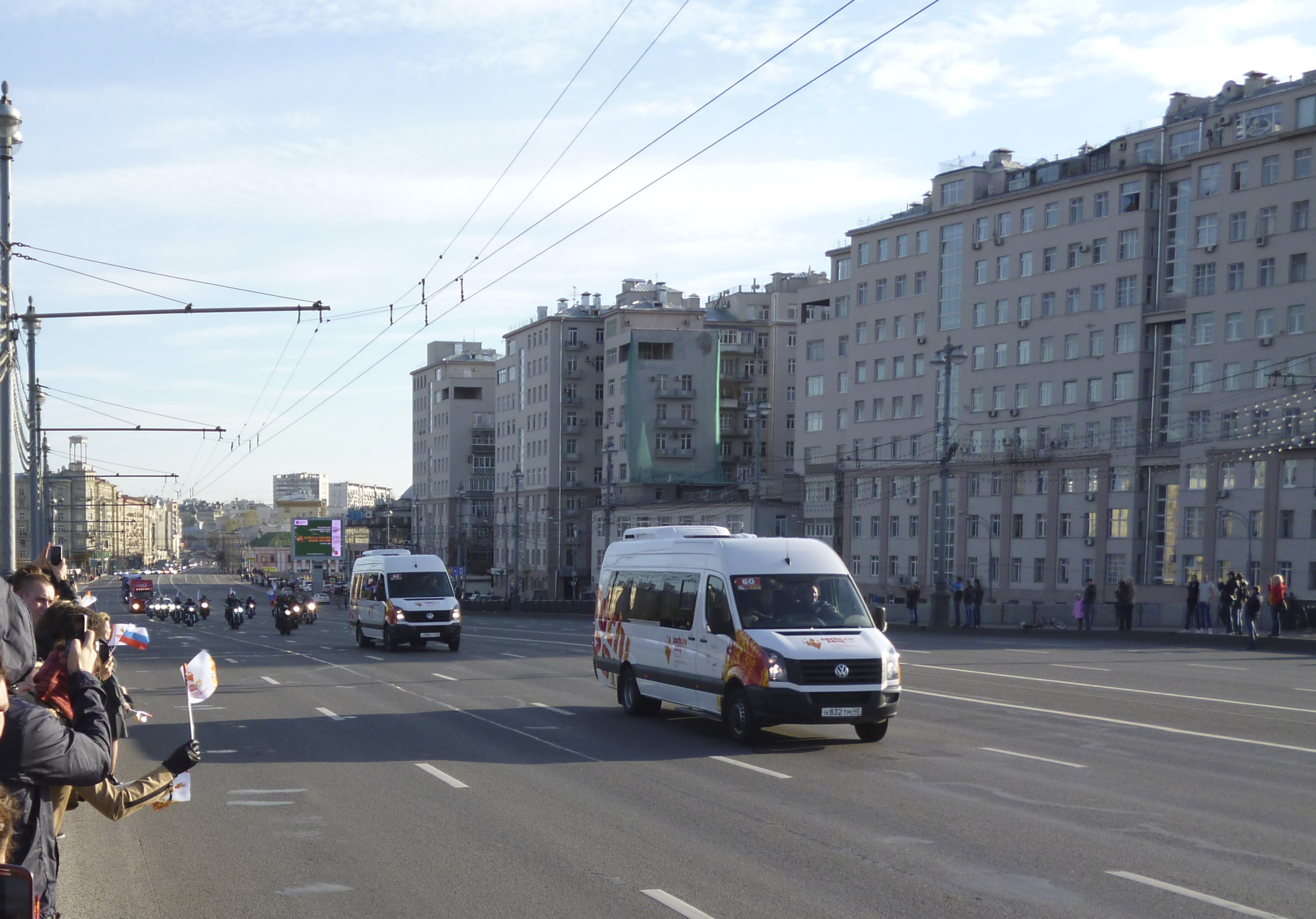 Кортеж с Олимпийским огнём следует из аэропорта Внуково по Большому Каменному мосту на Красную площадь in Moscow, Russia.